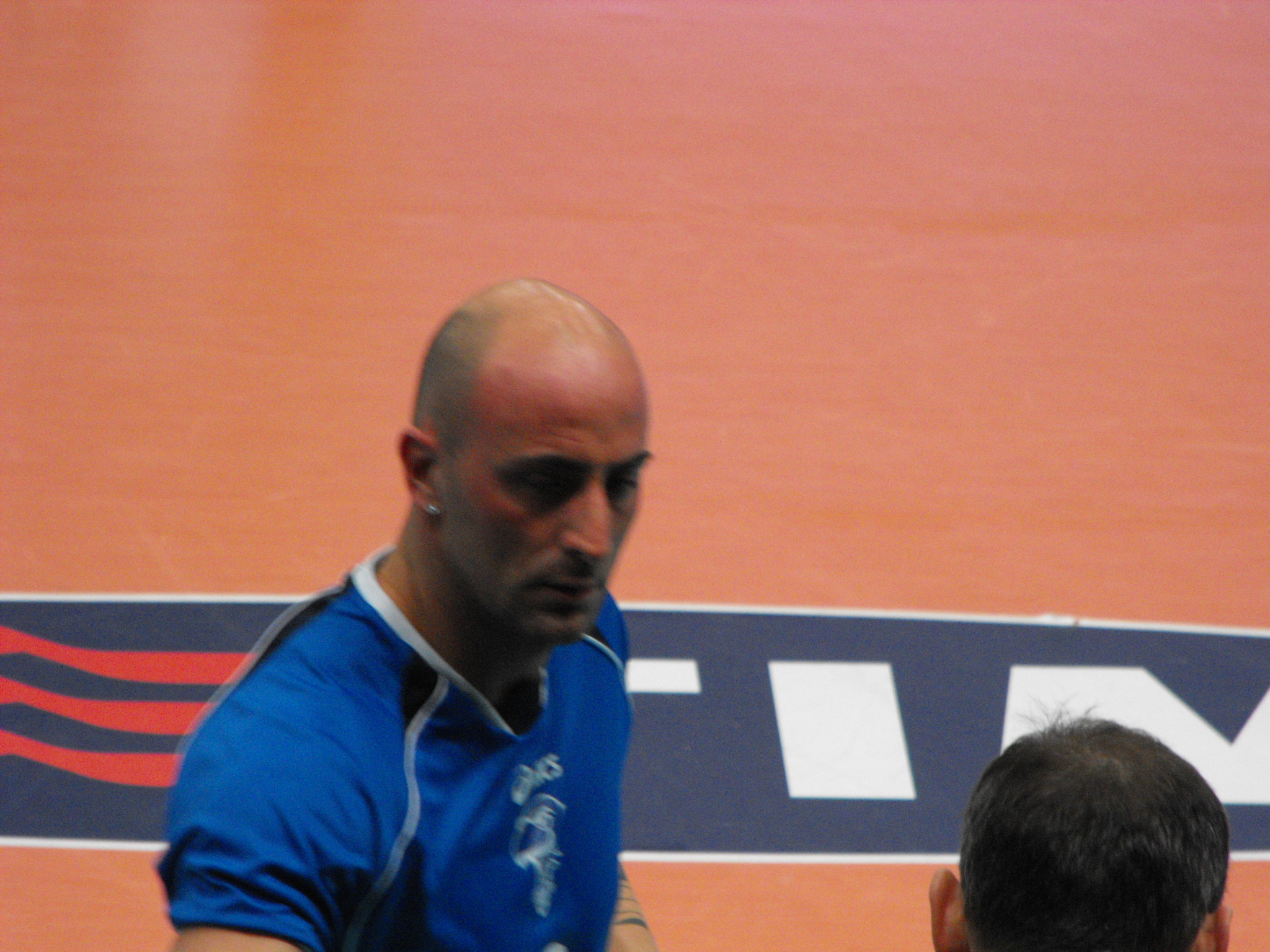 Francesco Biribanti, opposto italiano